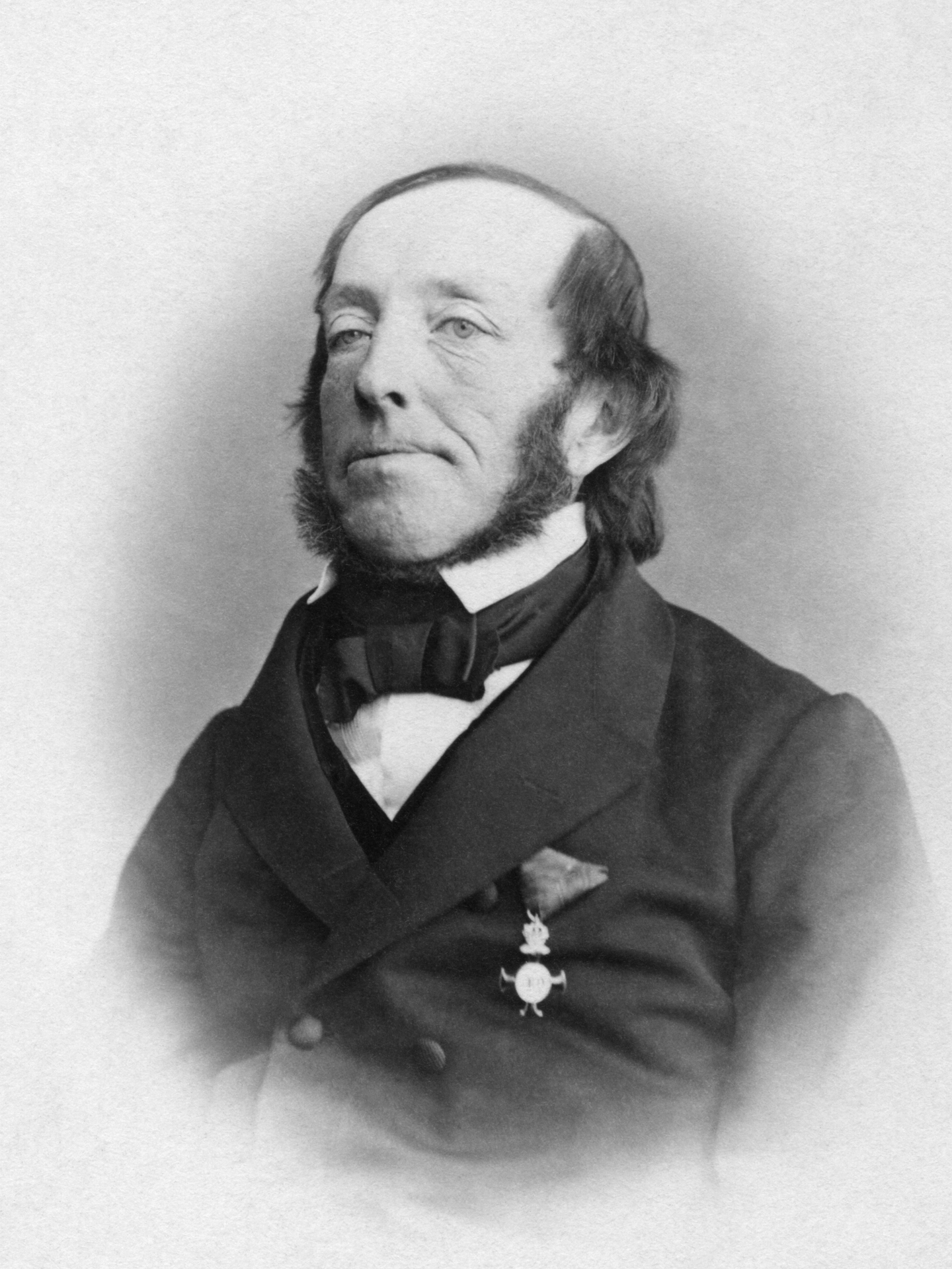 Portrait von Christof Conrad Weinmeister